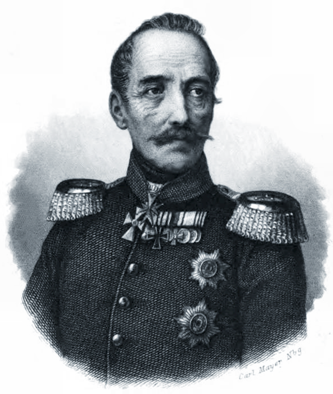 Friedrich Graf zu Dohna-Schlobitten, preußischer Generalfeldmarschall 1858/59